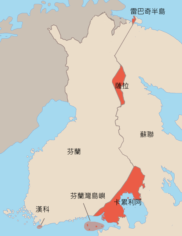 冬季戰爭後芬蘭割給蘇聯的領土